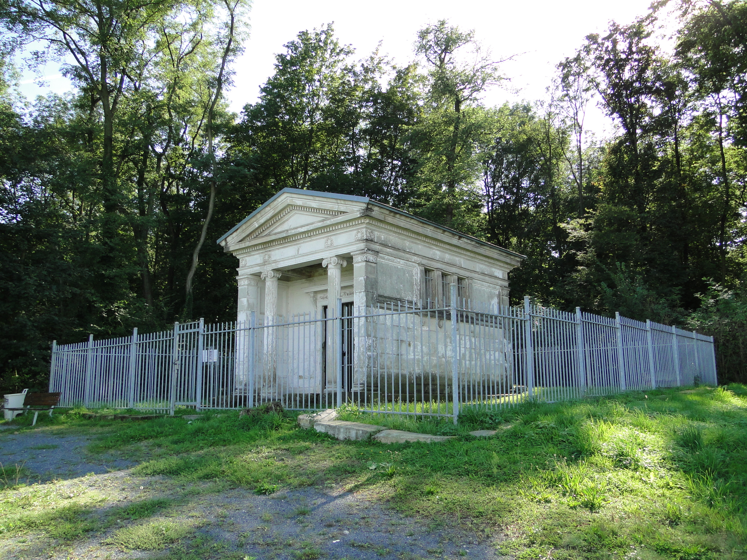 Kulturdenkmal Am Viertelacker Dresden Mausoleum Familie Kap-Herr